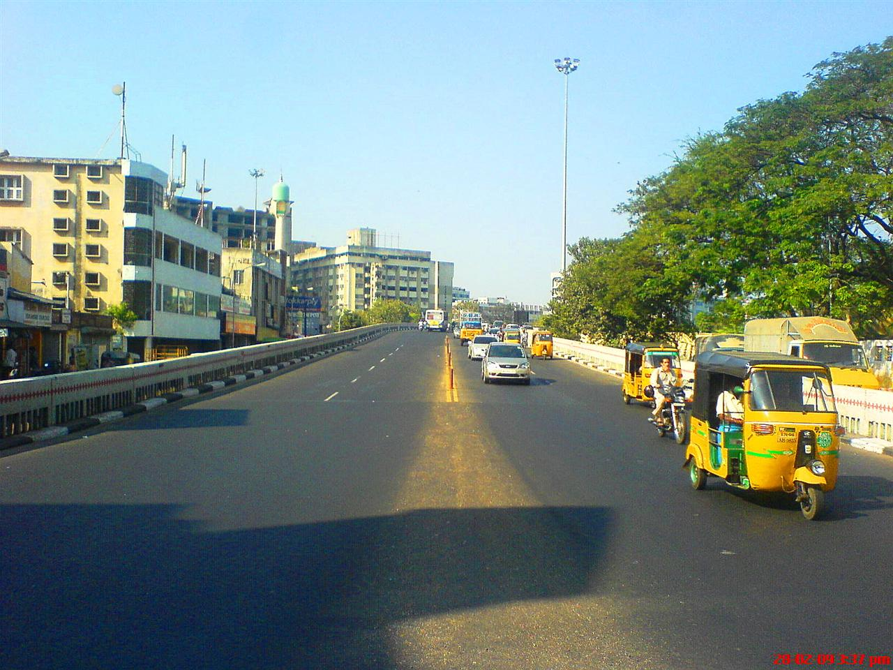 On the edge of Gemini Flyover, Mount Road, Chennai. Looking towards the side of thousand lights